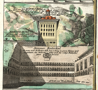 Salzburg, Mönchsberg mit Felsenreitschule from: Prospectus Elegantiores Splendidissimae Archiepiscopalis Urbis Salisburgensis praecipuarumque in ea Illustrium, ac maxime mirabilium, tam Sacrarum quam profanarum Aedium